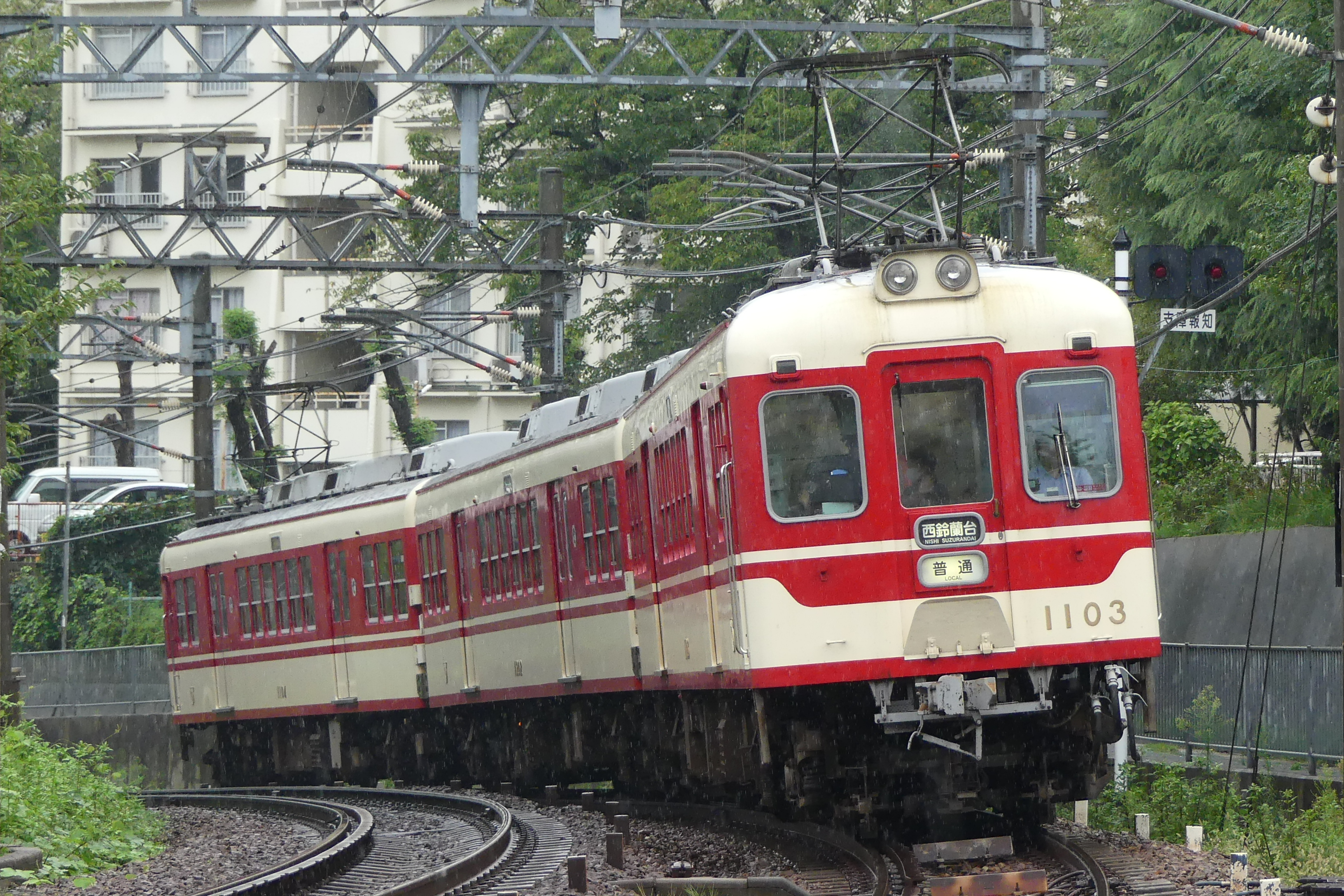 神戸電鉄1100形電車